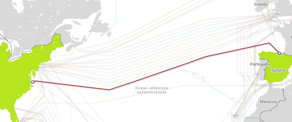 MAREA è un cavo di comunicazioni transatlantiche lungo 6600 chilometri che fisicamente collegherà la Virginia, USA e Bilbao, Spagna, nato dalla collaborazione di Microsoft, Facebook e Telefónica. La massima capacità trasmissiva sarà di 160 Tbps (Terabits al secondo). Le operazioni di costruzioni saranno dirette dalla Telxius, una filiale della società spagnola telecom Telefónica. Esse dureranno dall'Agosto 2016 all'Ottobre 2017. Il nome del progetto deriva dal termine marea in spagnolo.